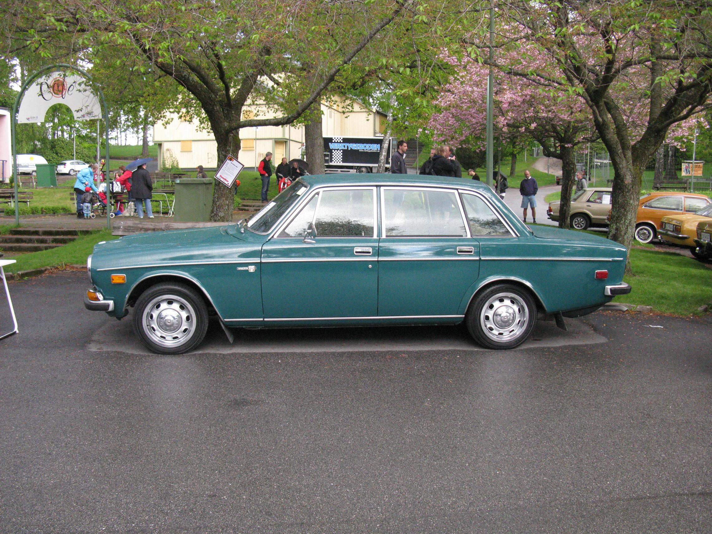 Volvo 164 E